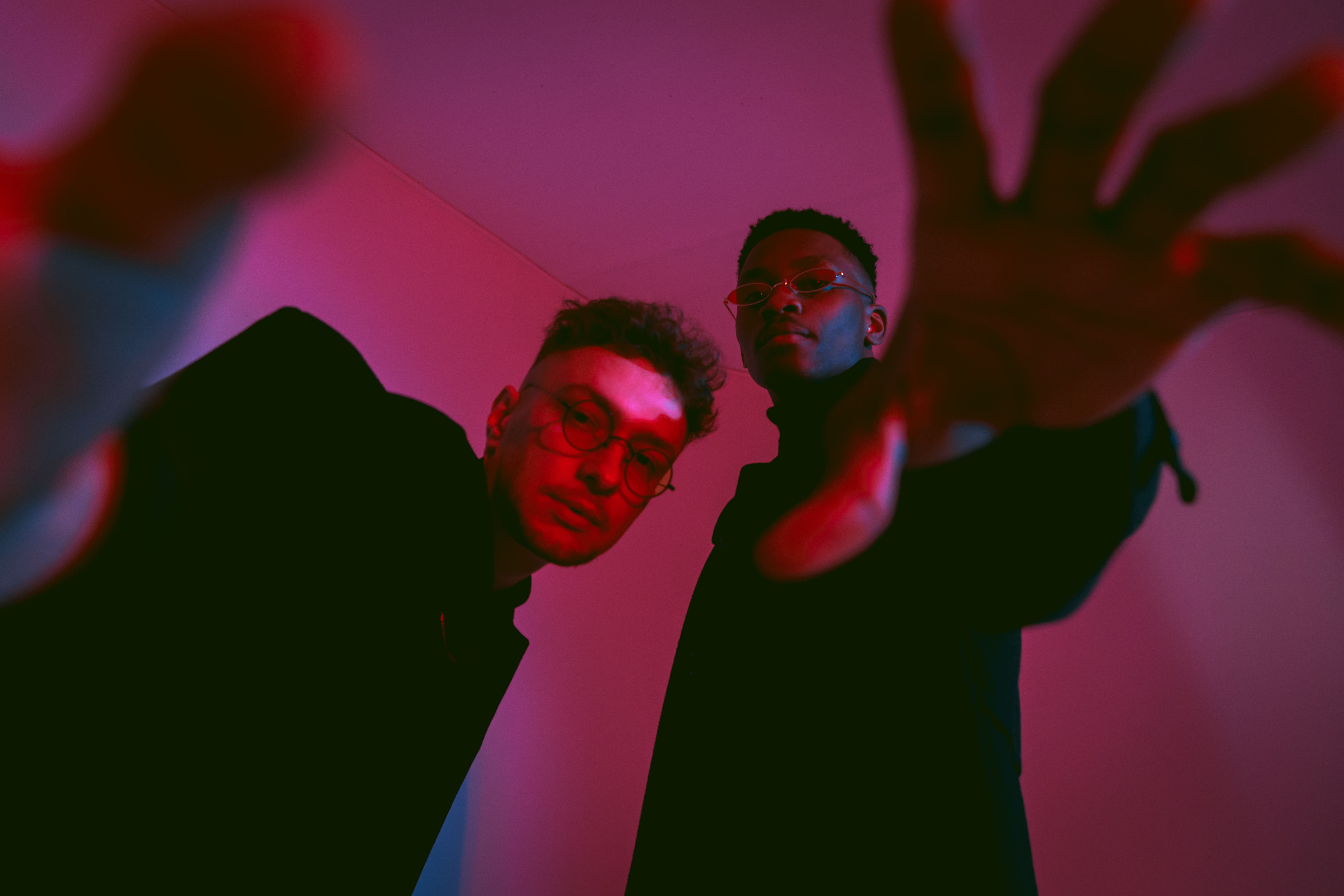 Офіційне фото релізу Bonfire